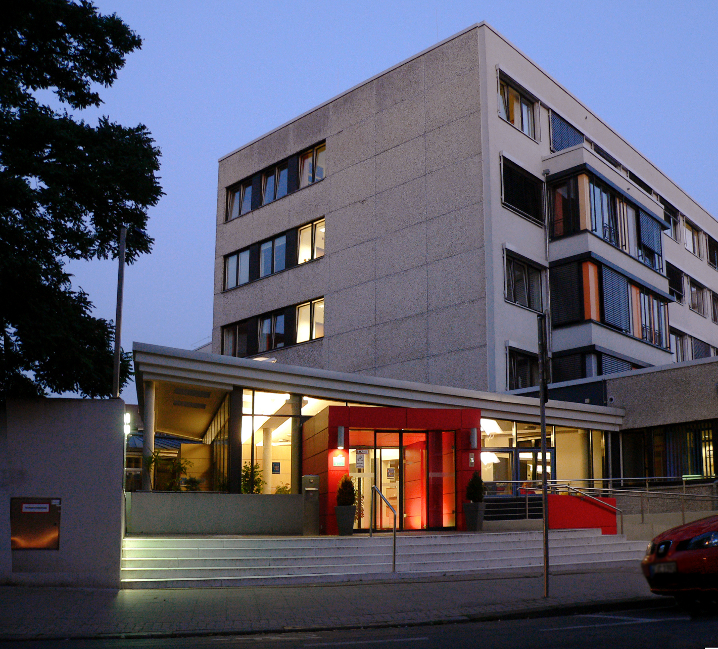 Haupteingang des Clementinenhauses Hannover